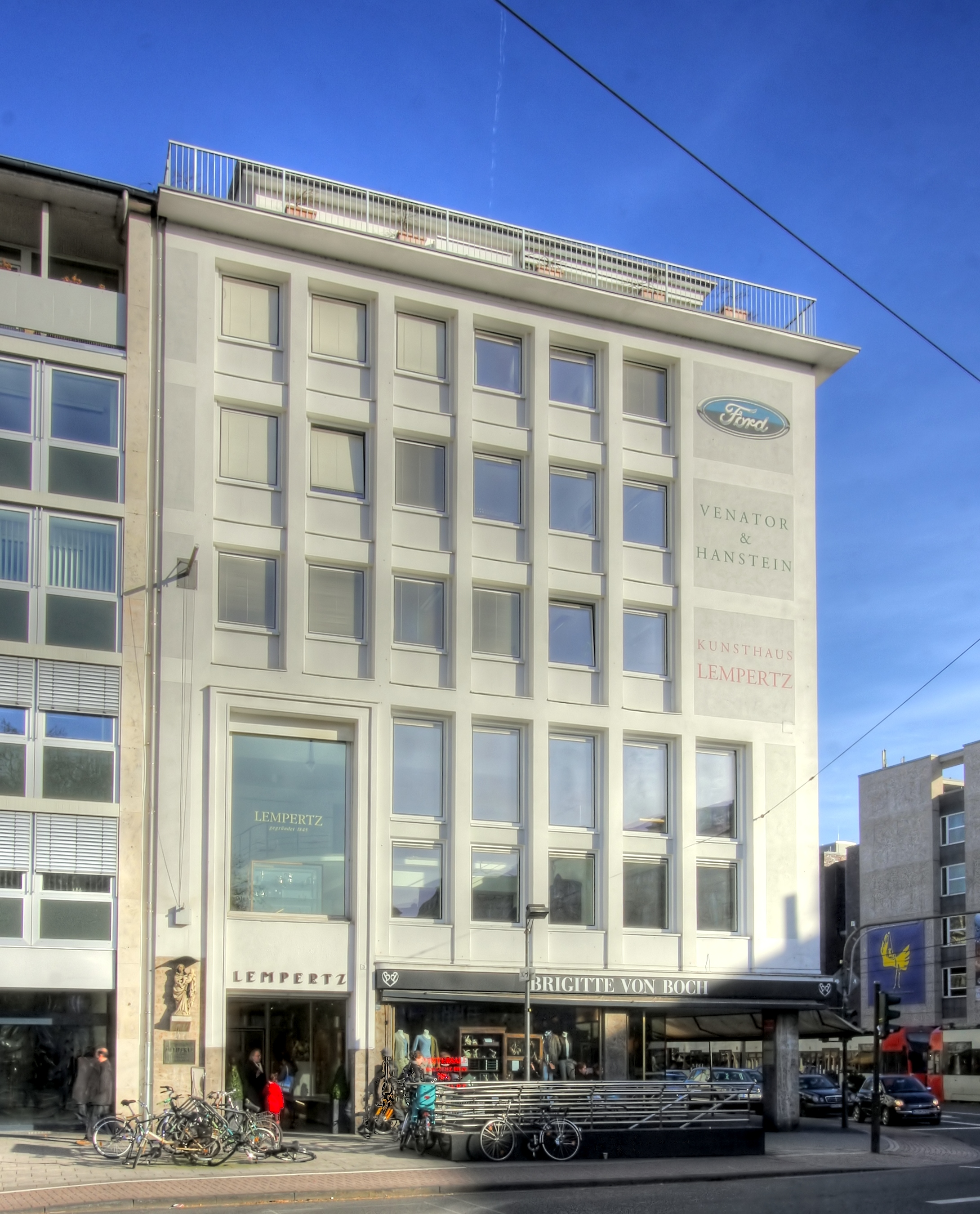 Kunsthaus Lempertz, Neumarkt 3, 50667 Köln